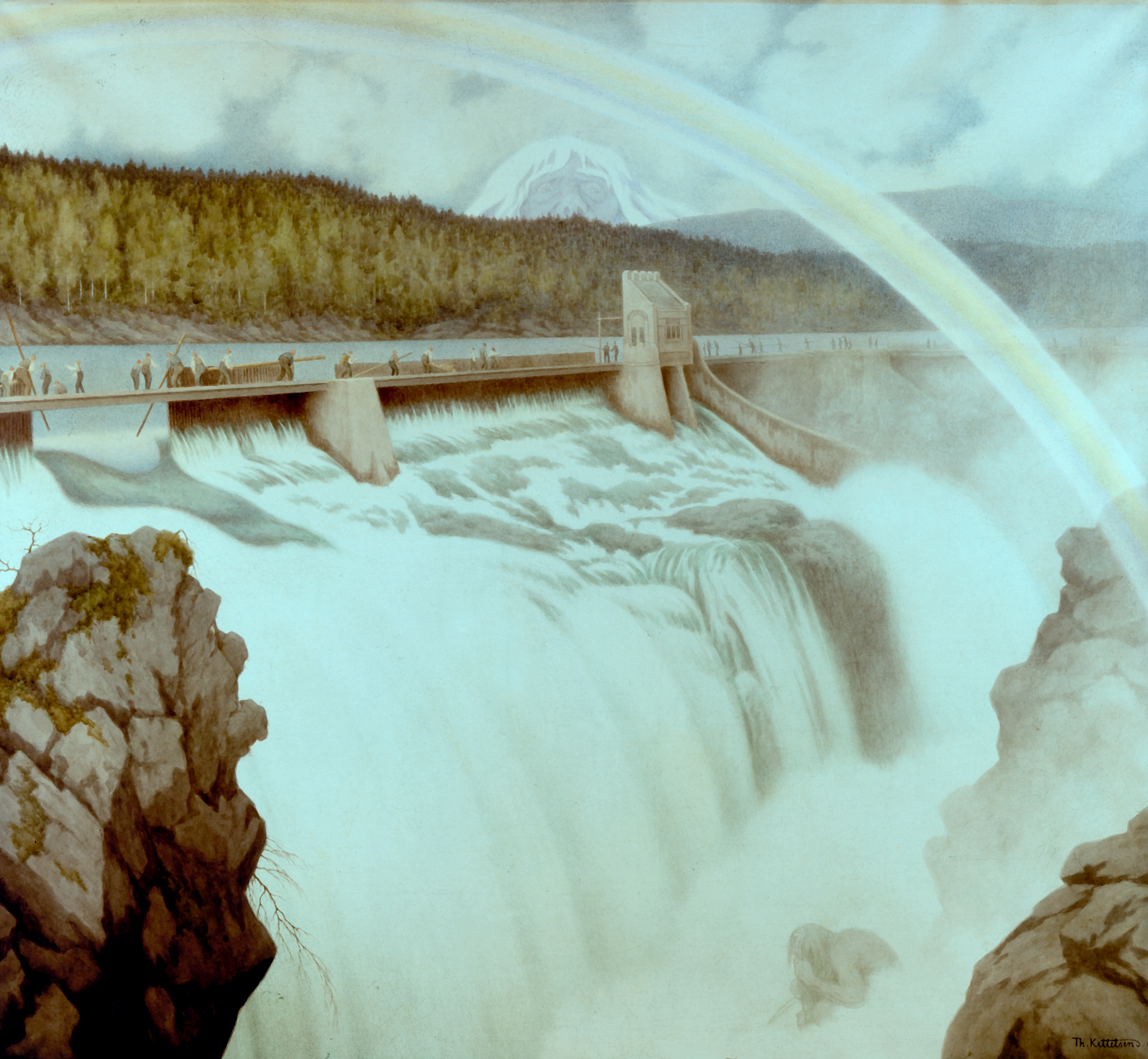 "Fossens eventyr"-serien